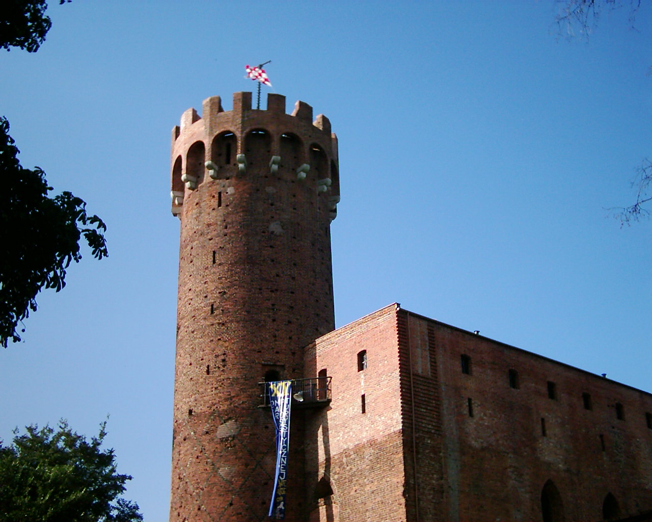 Zamek w Świeciu